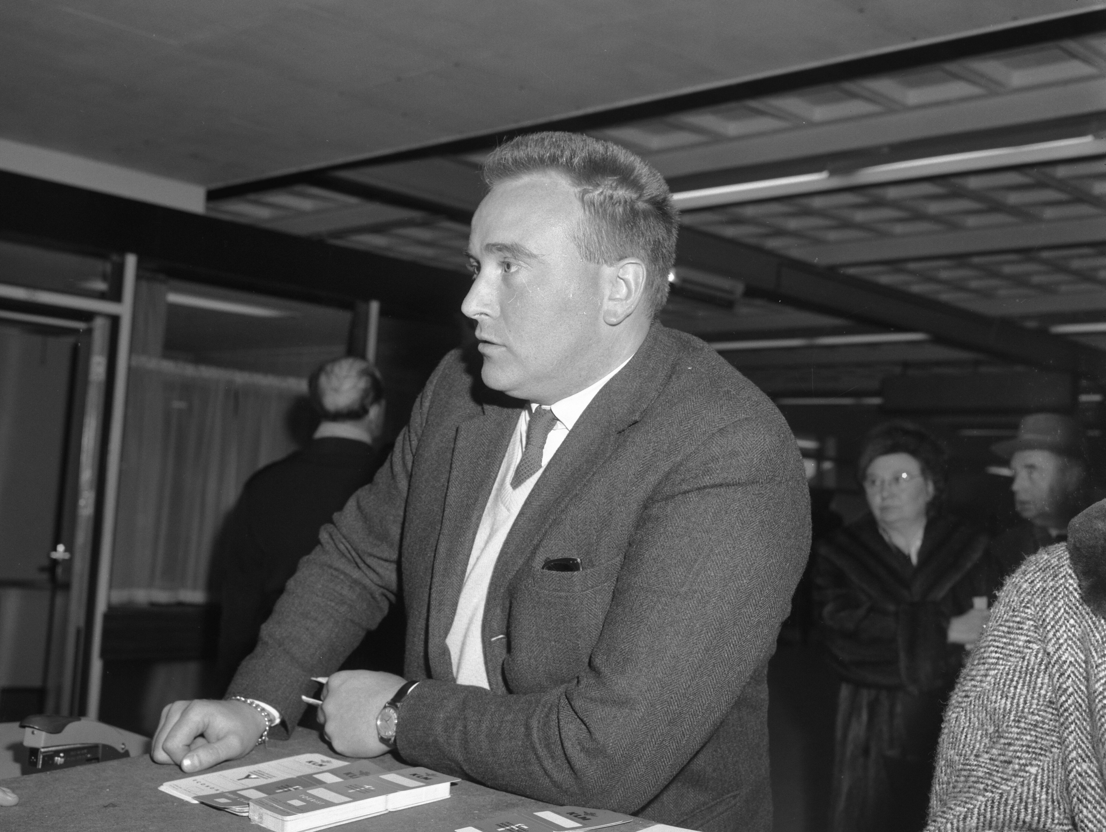 Collectie / Archief : Fotocollectie Anefo Reportage / Serie : [ onbekend ] Beschrijving : Carlson (winnaar Rally Monte Carlo ) Datum : 6 februari 1962 Trefwoorden : Winnaars Persoonsnaam : Carlson Instellingsnaam : Rally Monte Carlo Fotograaf : Bilsen, Joop van / Anefo Auteursrechthebbende : Nationaal Archief Materiaalsoort : Negatief (zwart/wit) Nummer archiefinventaris : bekijk toegang 2.24.01.04 Bestanddeelnummer : 913-4923